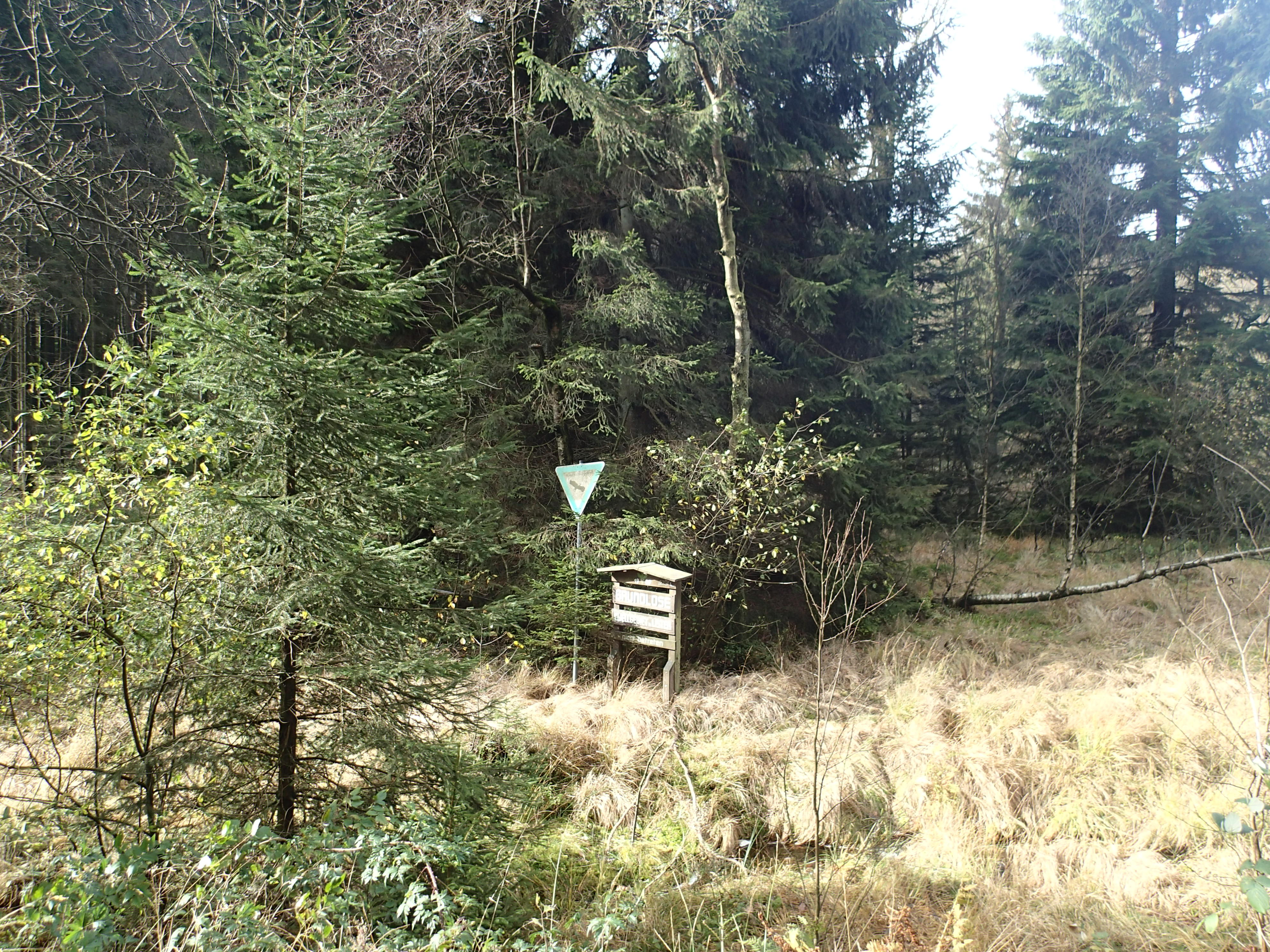 Lister (Fluss), Quellgebiet im Naturschutzgebiet „Auf’m Ebbe“ in Meinerzhagen. Schrift auf dem Schild: Grundlose / Quellgebiet d. Lister / nicht betreten